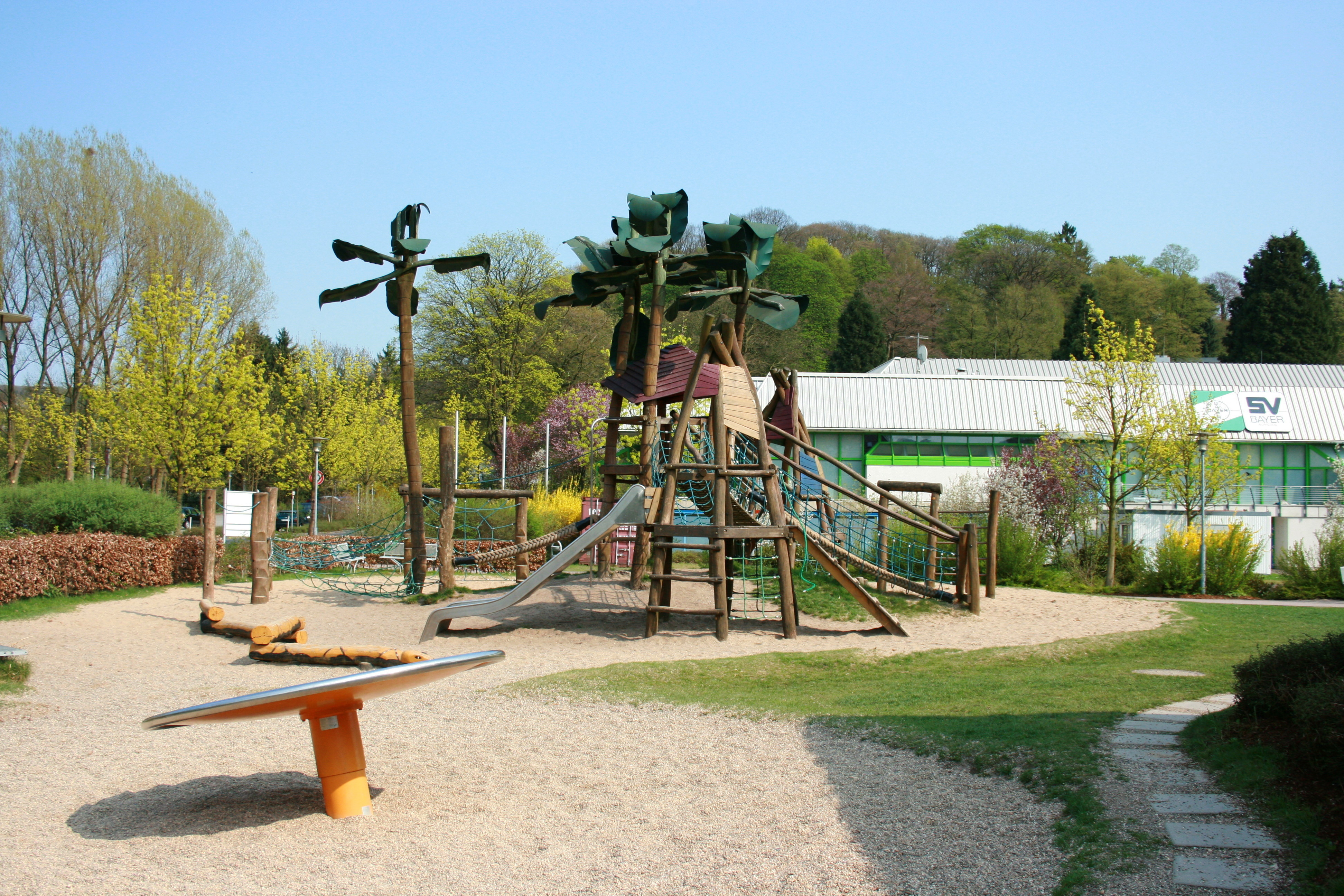 Bayer-Sportpark, Unten vorm Steg in Wuppertal